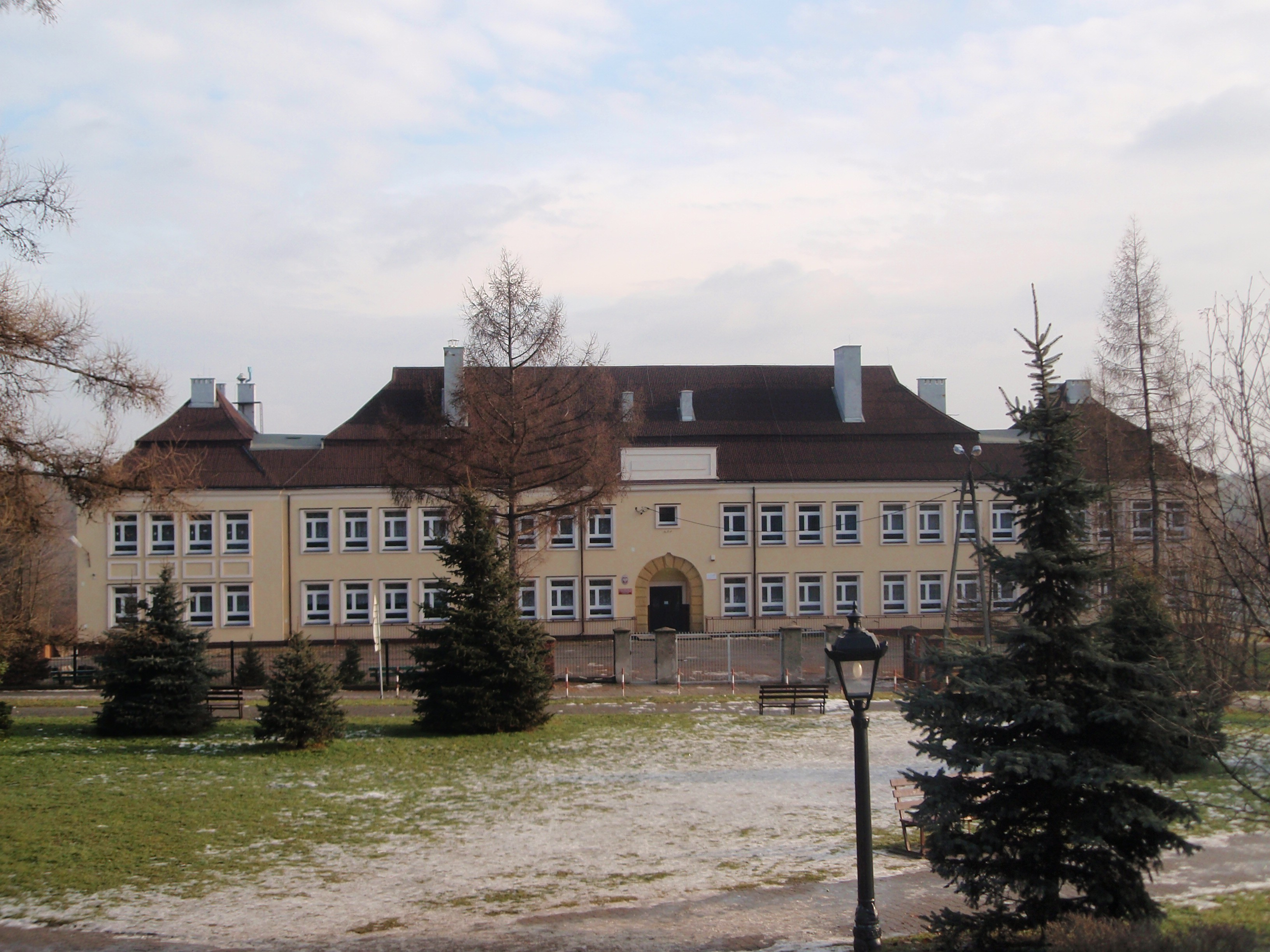 Szkoła podstawowa im. J. Baranowskiego w Sławkowie (woj. śląskie)